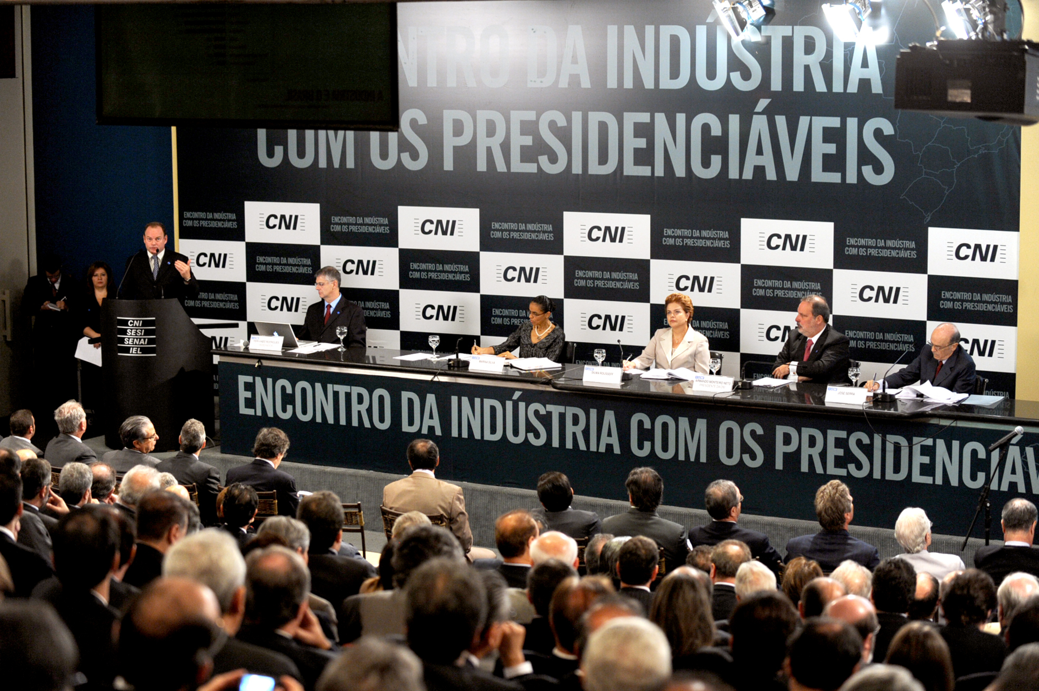 O jornalista Fernando Rodrigues, os pré-candidatos à Presidência da República, Dilma Rousseff, José Serra e Marina Silva, e o presidente da CNI, Armando Monteiro Neto, durante encontro com representantes da indústria, promovido pela Confederação Nacional da Indústria (CNI).